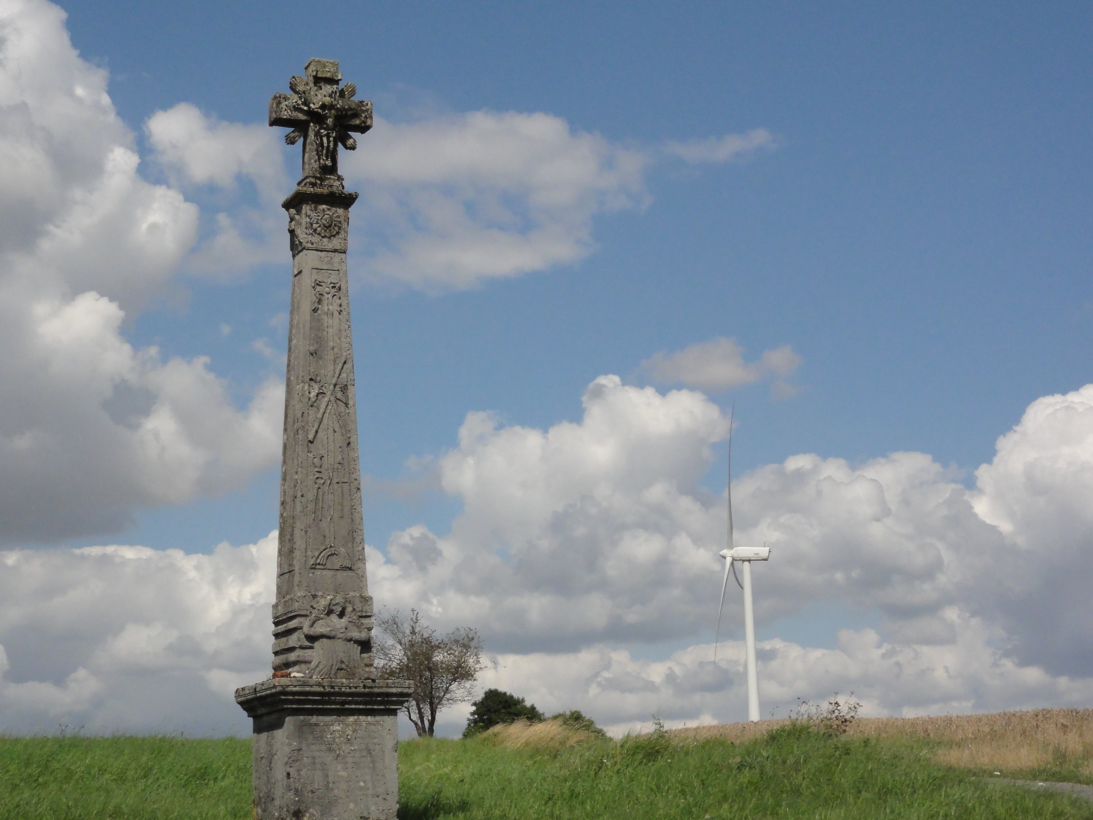 Géry (Meuse) croix de chemin A et eolienne